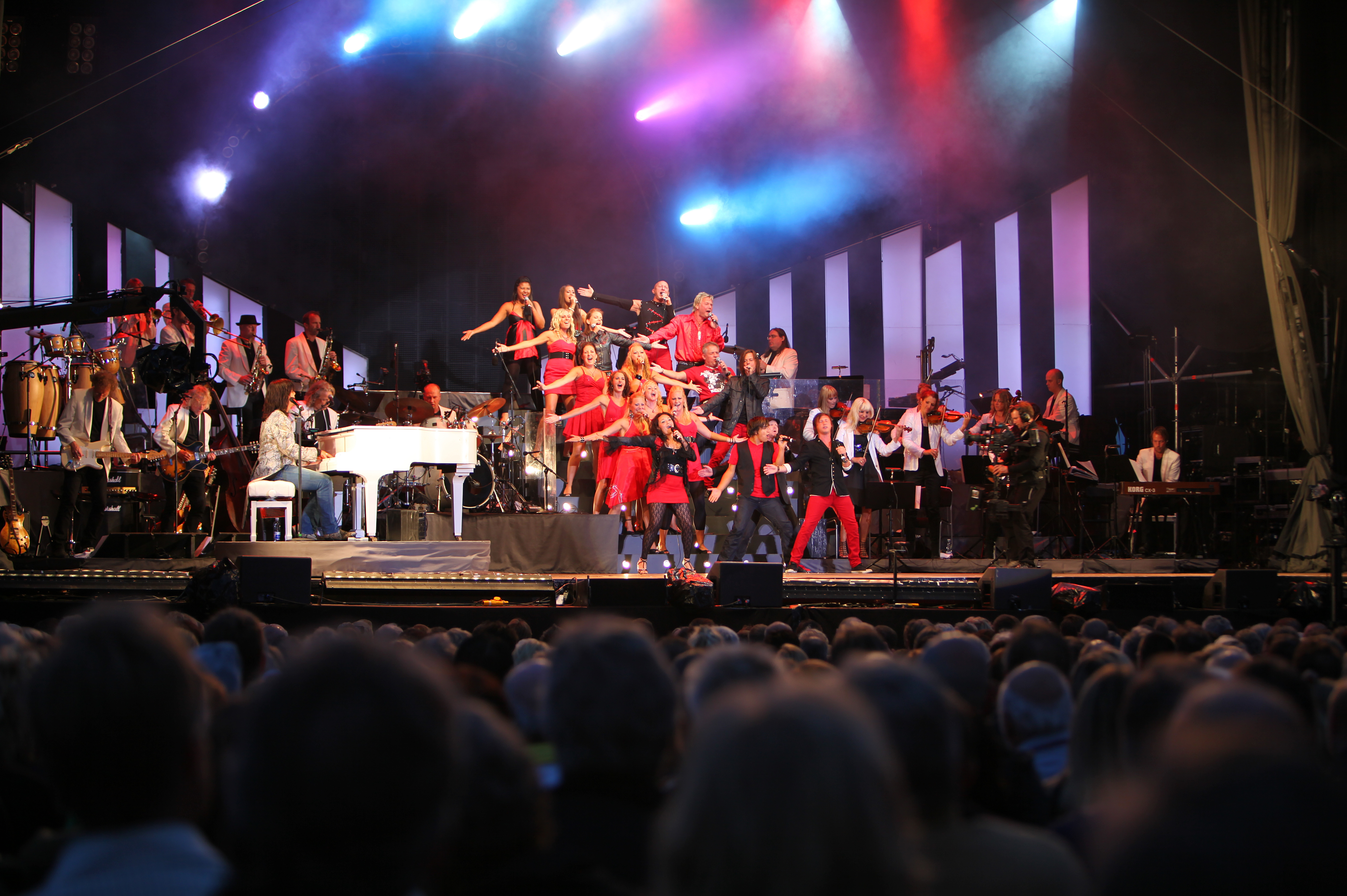 Rhapsody in Rock concert at Skansen, Stockholm, Sweden.